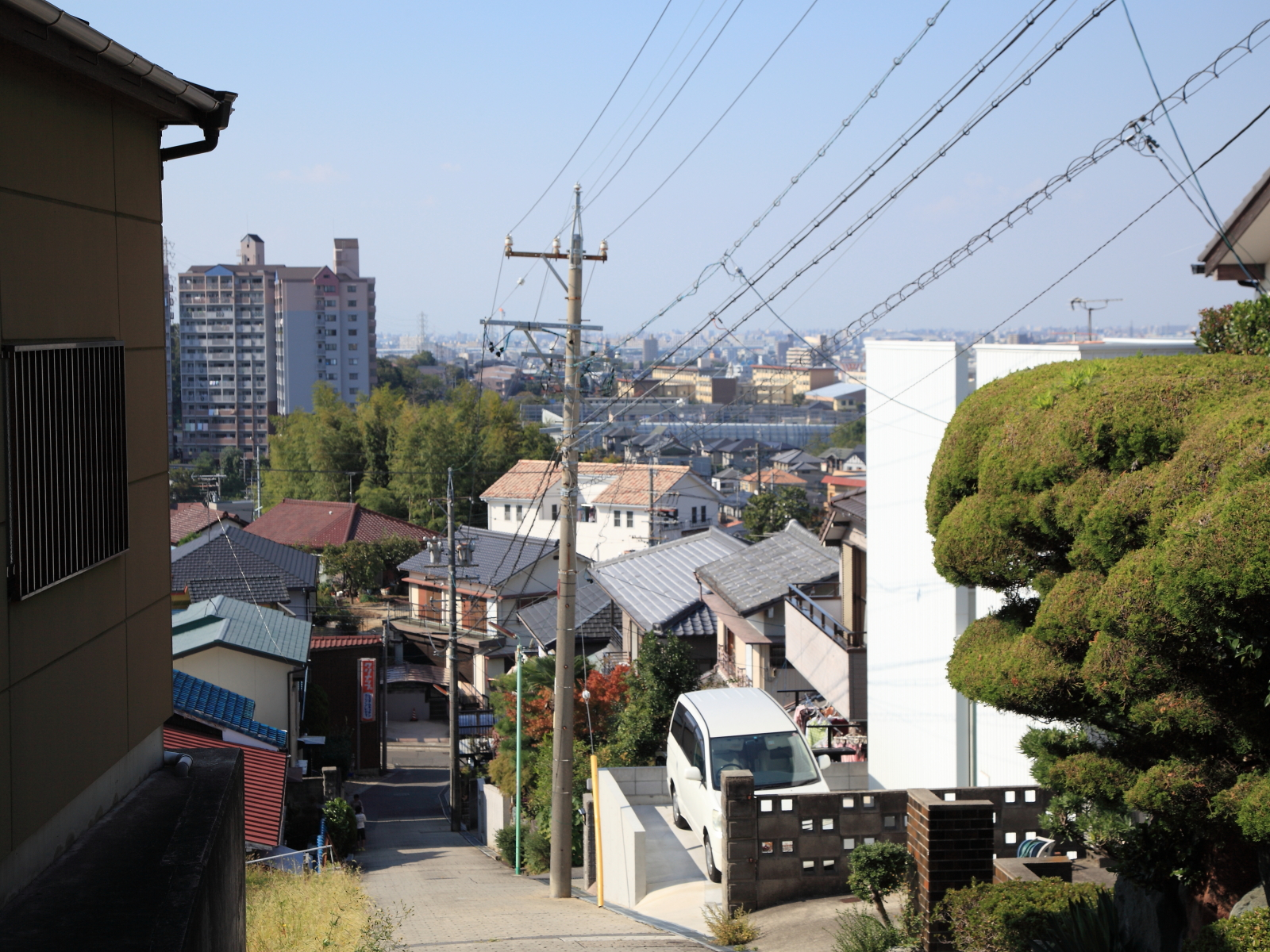 高根山山頂より北西方面を望む（名古屋市緑区、2012年）